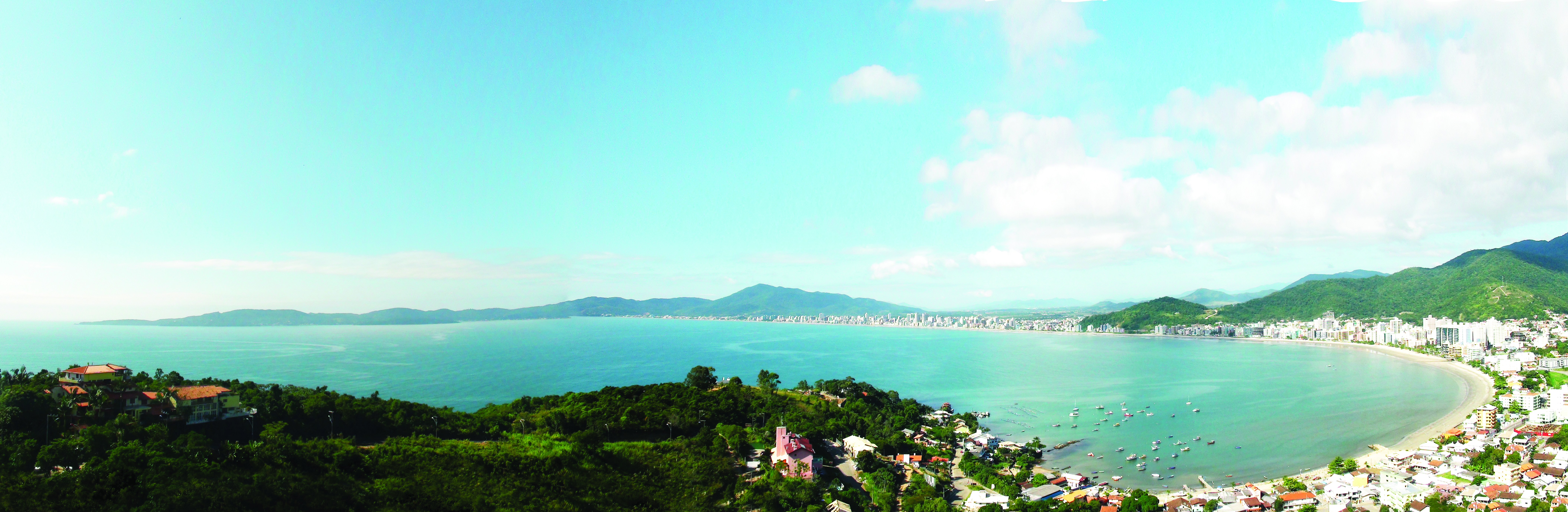 Vista da cidade de Itapema - Santa Catarina